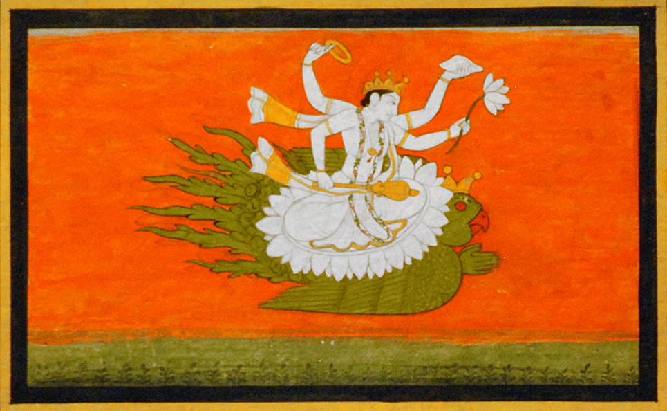 Vishnu sur Garuda Peinture sur carton Inde Museo nazionale d'arte orientale (MNAO), Roma, Italia Article de Wikipedia sur Garuda Site officiel du musée